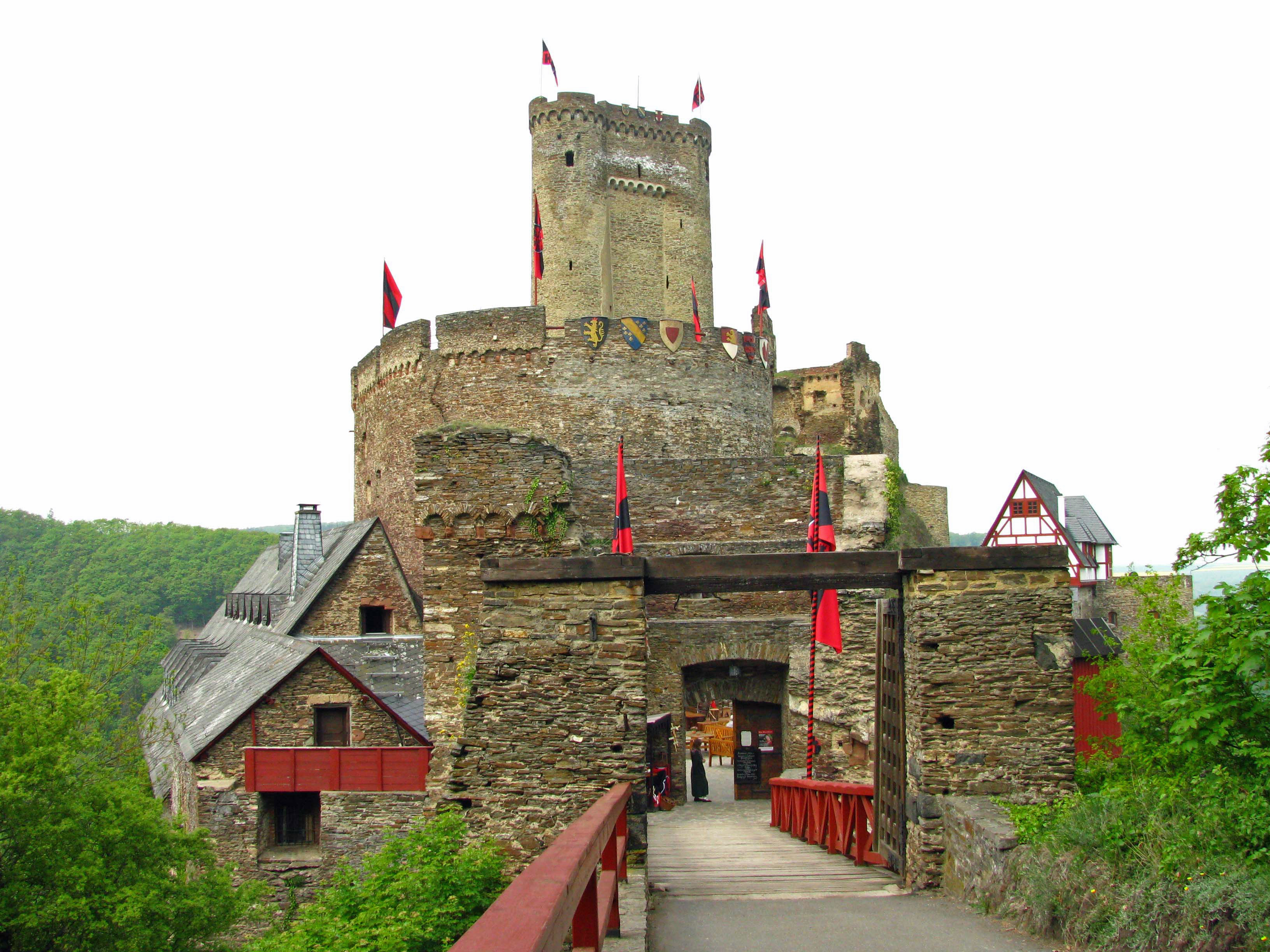 Die Ehrenburg bei Brodenbach Anfang Mai 2009